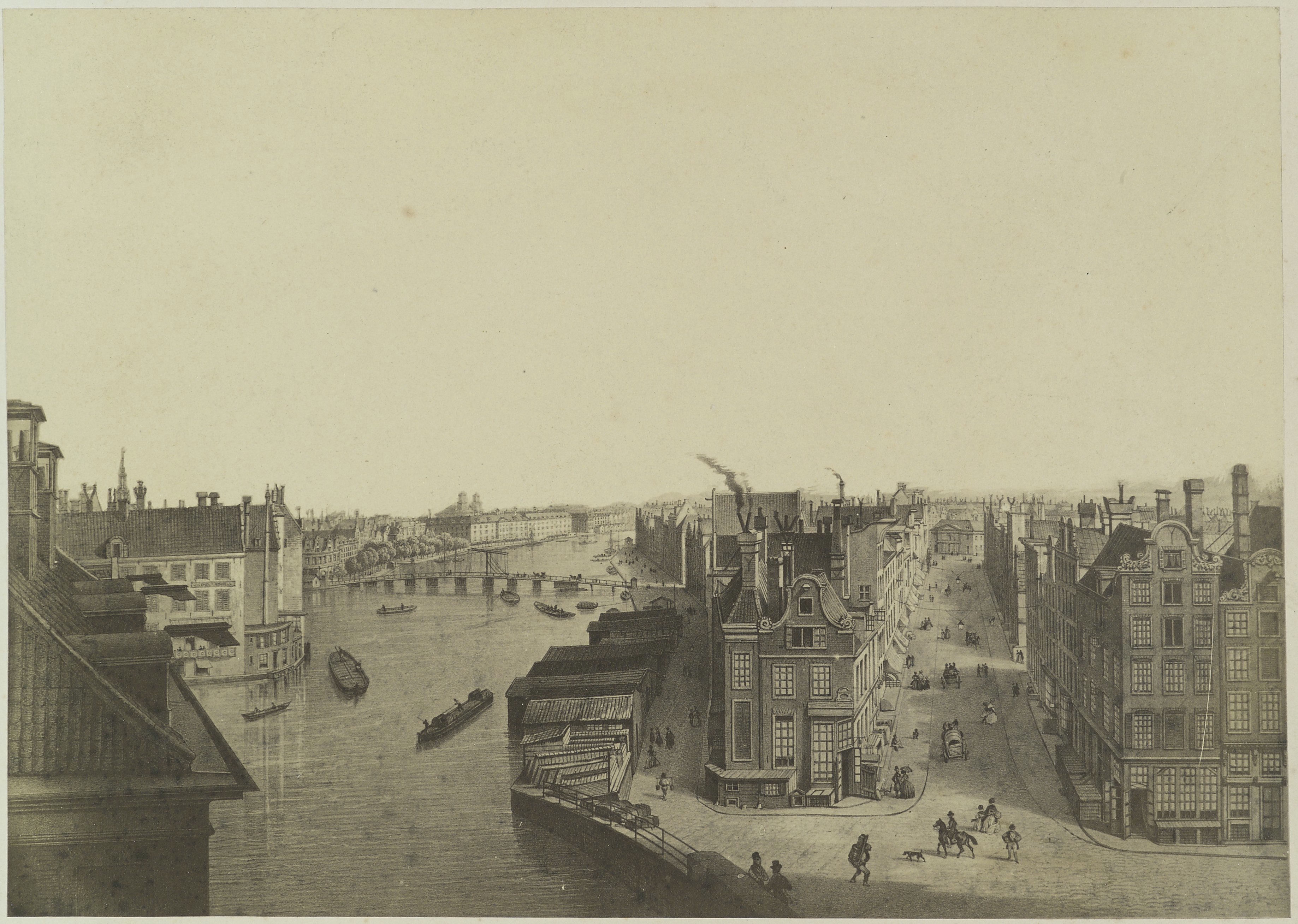 Prent/ Panorama: Foto van prent van panorama (opmerking: Bijschrift: Panorama van de Munttoren)